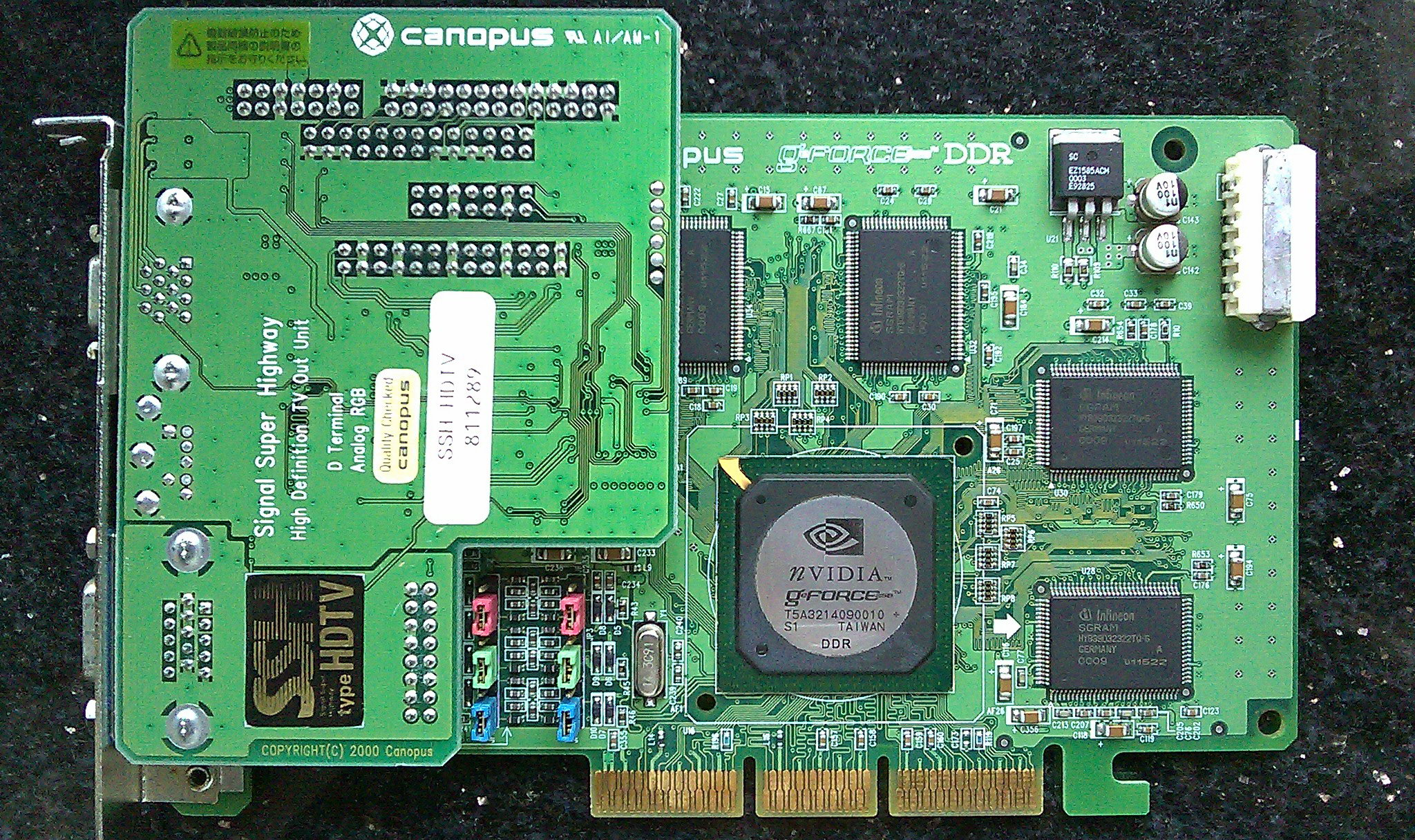 カノープスのビデオカードSPECTRA 7400 DDR、2000年2月初旬発売。